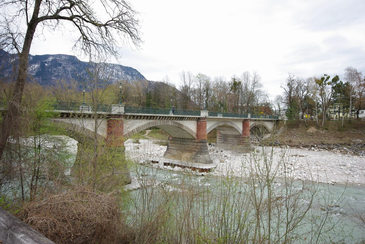 Luitpoldbrücke, Bad ReichenhallThis is a photograph of an architectural monument.